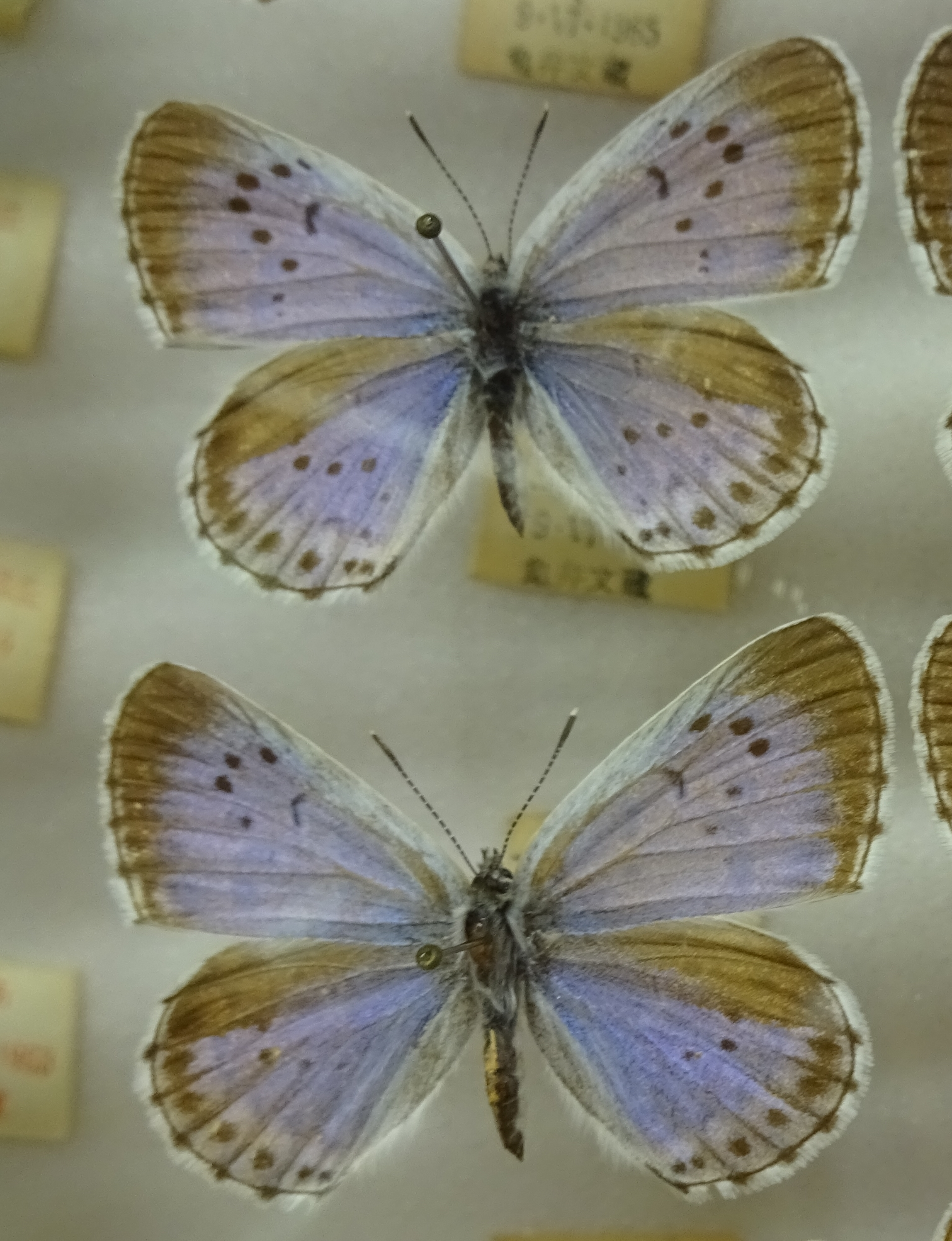 オオルリシジミ